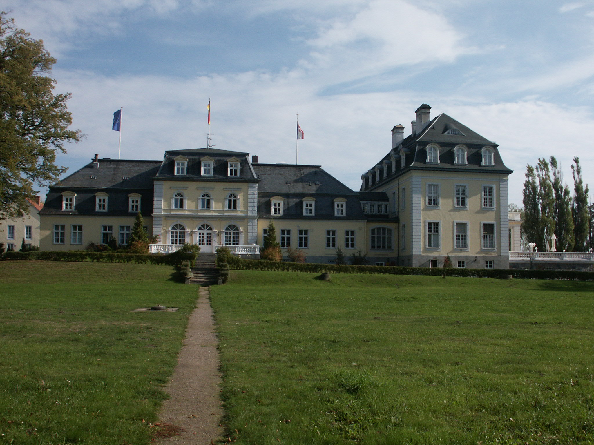 Schlosshotel Groß Plasten; Sicht aus dem Garten